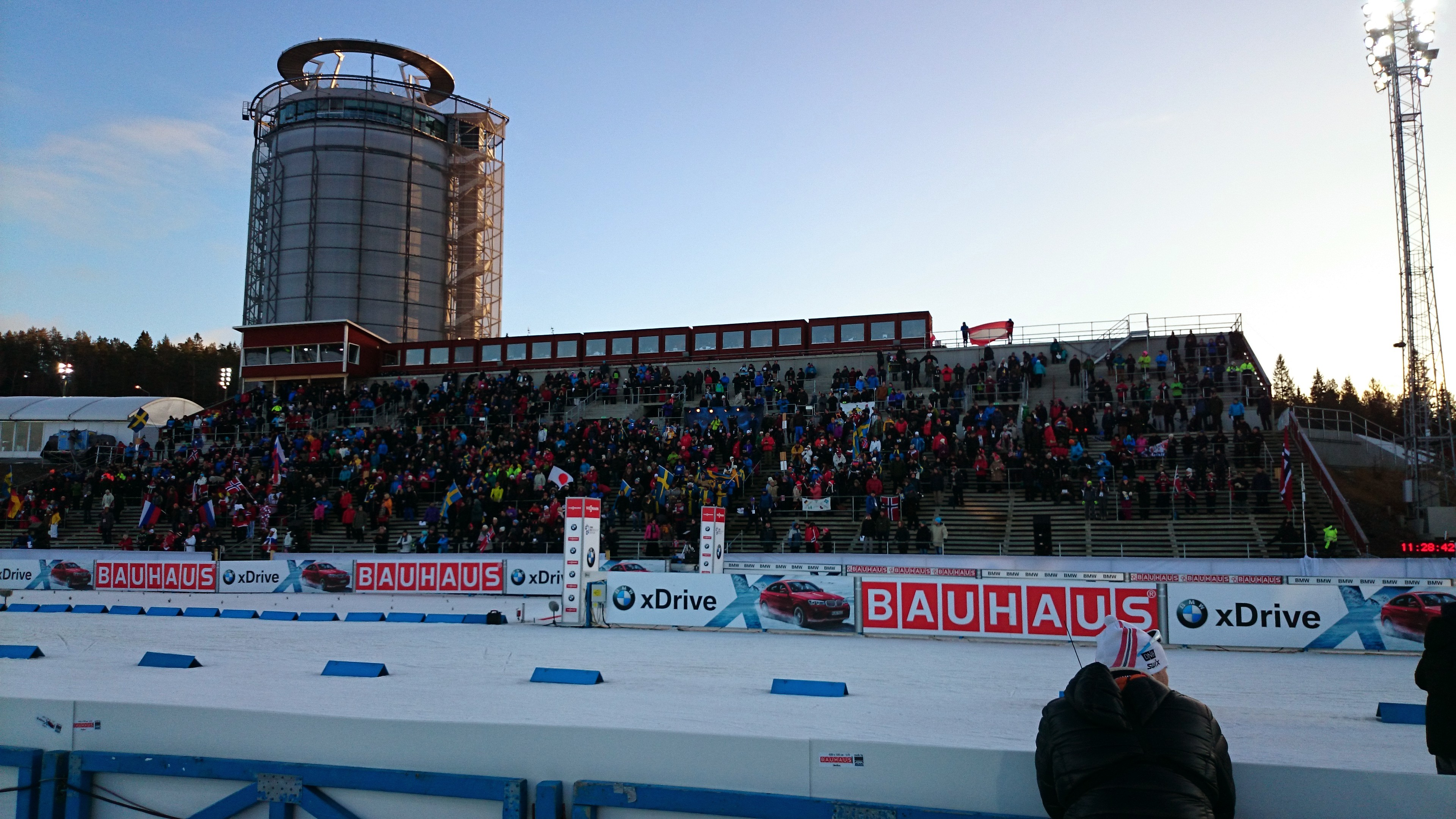 Läktaren på Östersunds skidstadion under skidskytte världscupen 2014. Arctura i bakgrunden